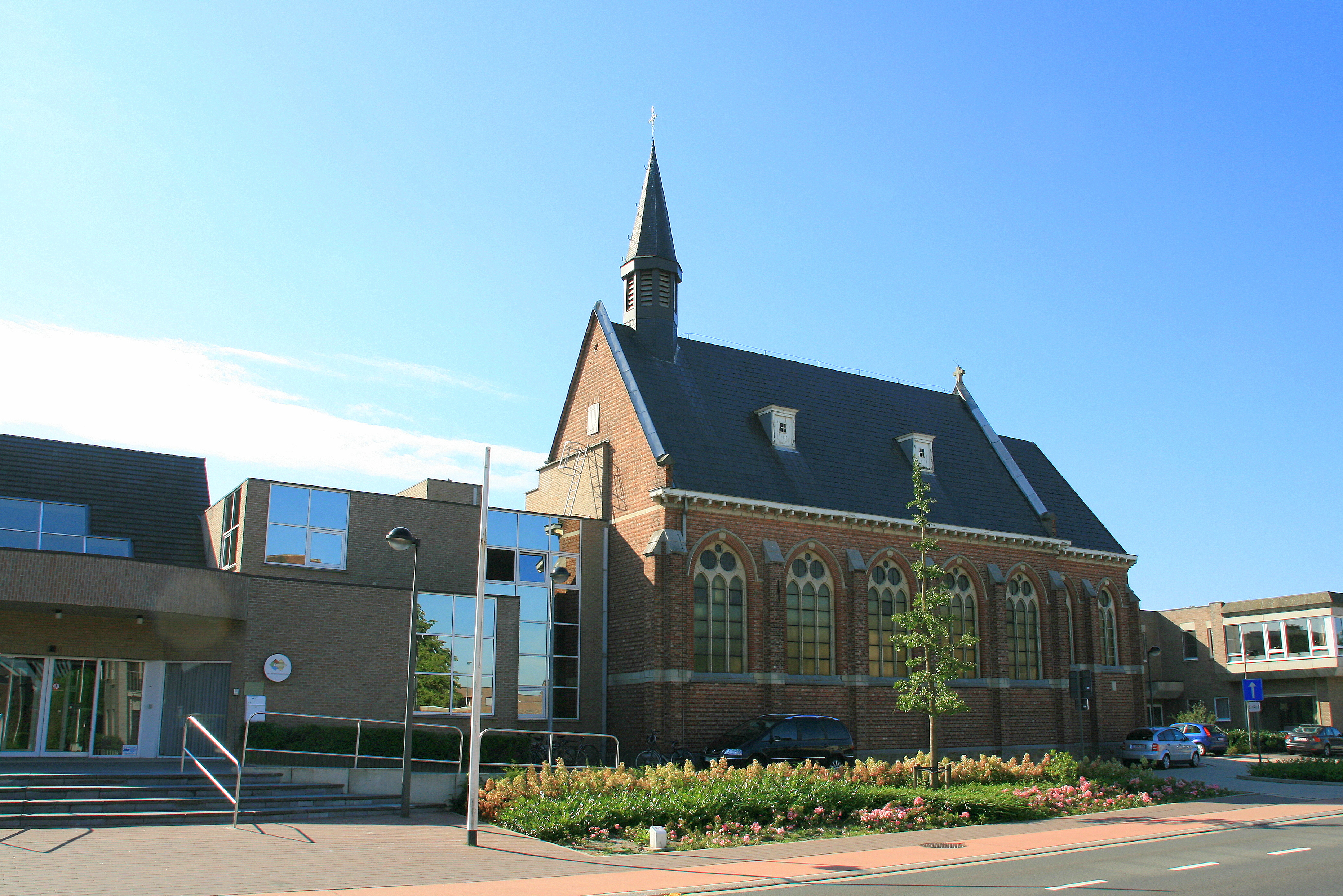 Het Klooster van de Zwartzusters met een neogotische kapel uit 1930. De Zwartzusters of Augustinessen uit Sint-Truiden vestigden zich hier in 1889 om zich aan gezondheidszorg te wijden nadat een epidemie van difterie was uitgebroken. Tegenwoordig worden vooral ouderen opgevangen.